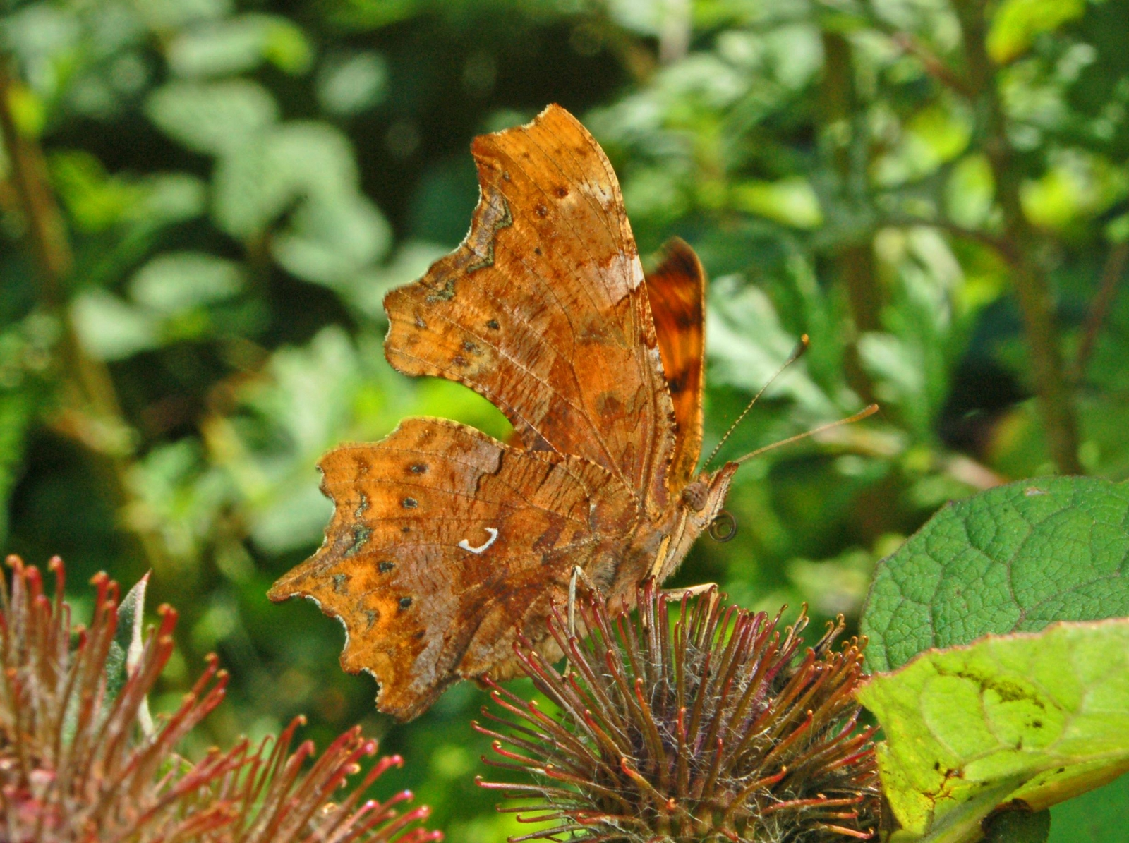 "Polygonia c-album". Val Noci, Genova, Italy